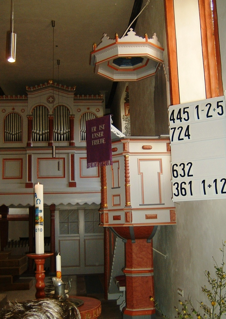 Martinskirche im Karbener Stadtteil Petterweil, Kanzel